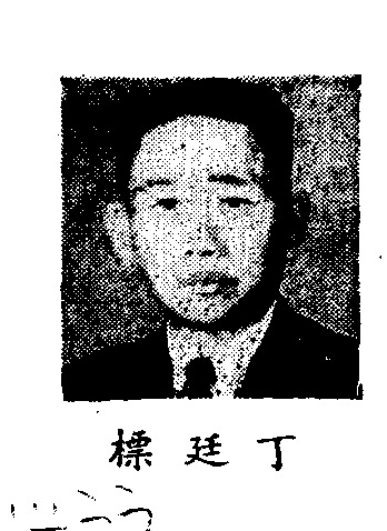 中文（中国大陆）: 制憲國民大會代表